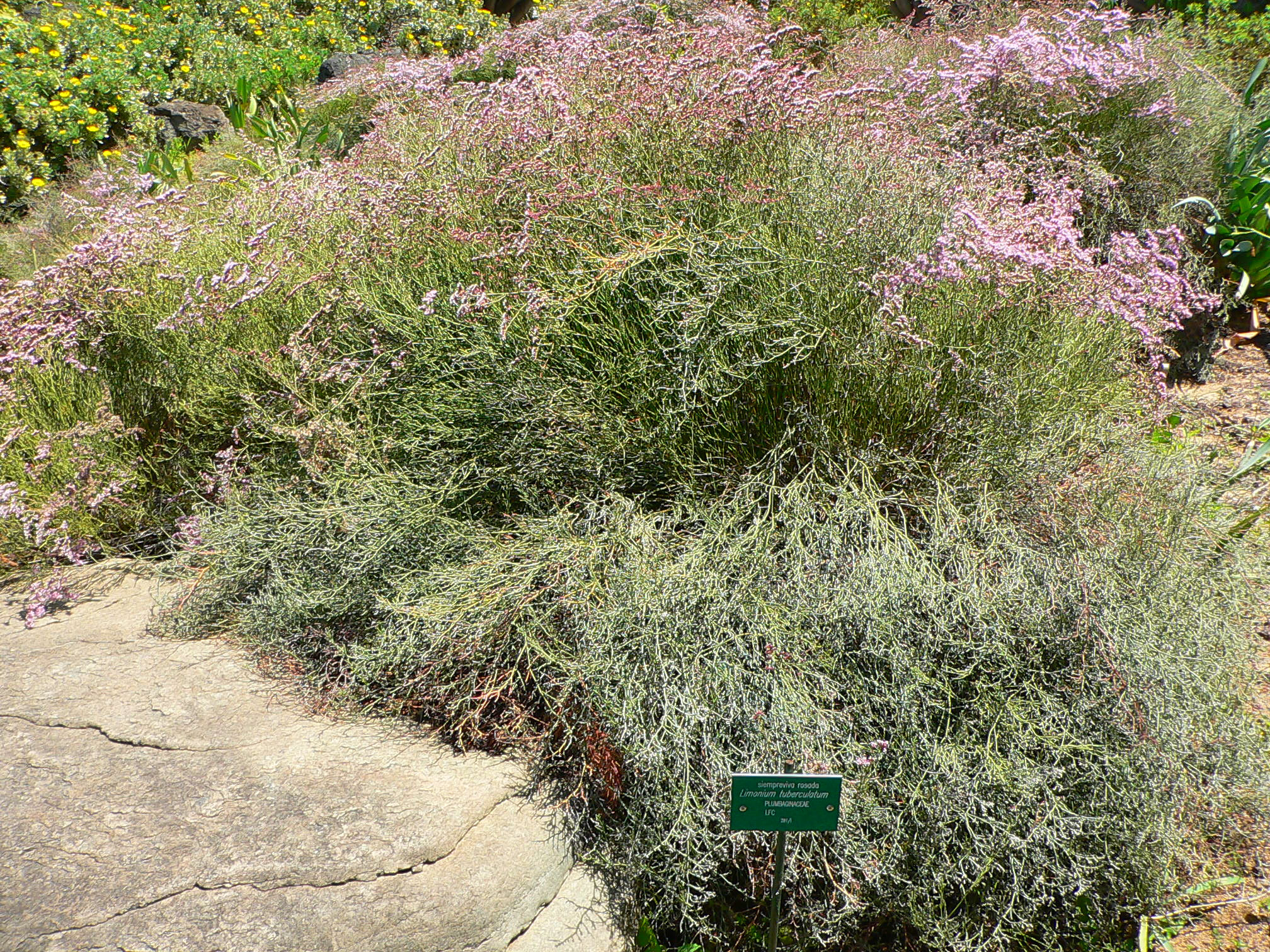 Limonium tuberculatum, from Lanzarote, Fuerteventura, Gran Canaria - at the "Jardín Botánico Canario Viera y Clavijo" (Gran Canaria)